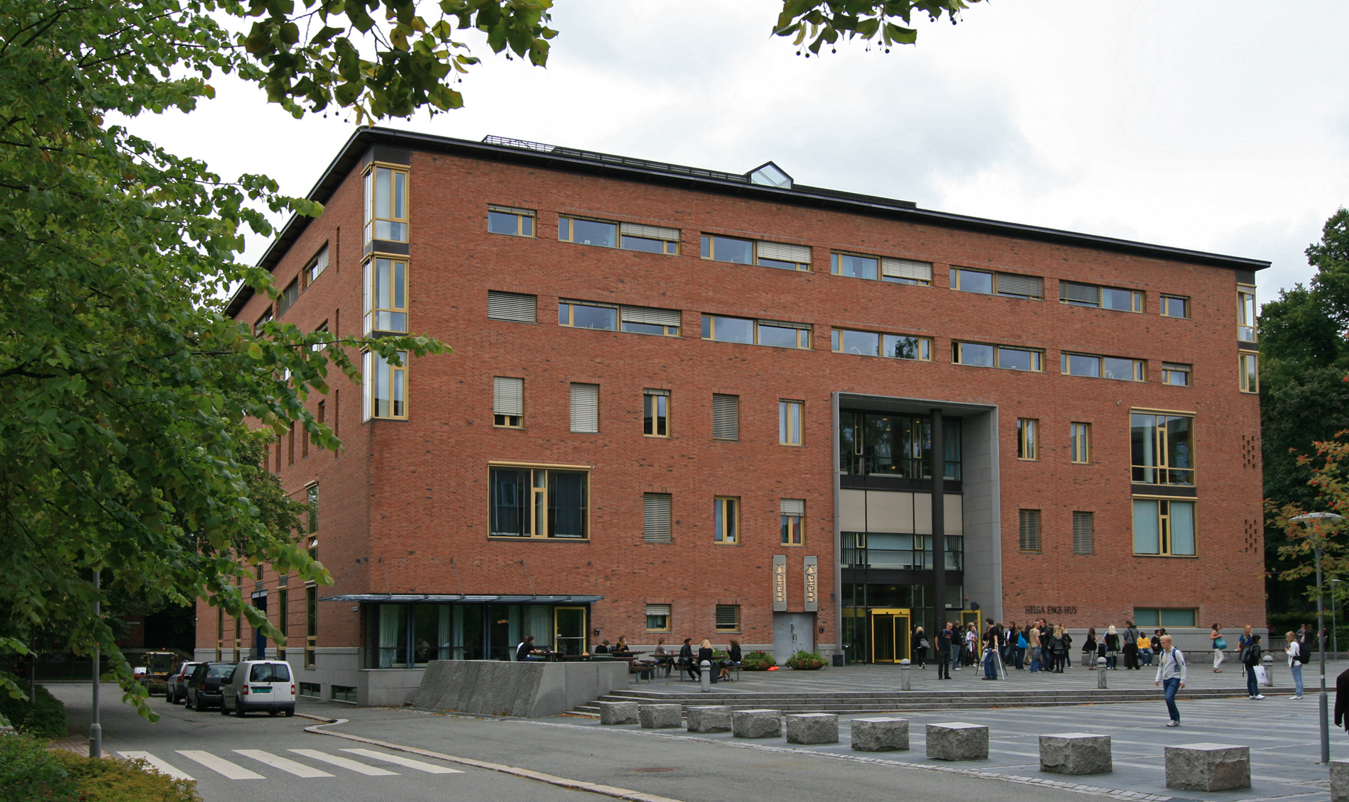 Helga Engs hus, Universitetet i Oslo. Bygd 1994. Arkitekter: Telje-Torp-Aasen AS.